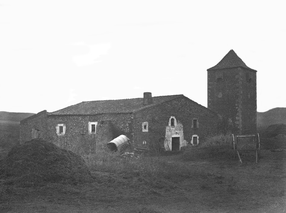 Imatge